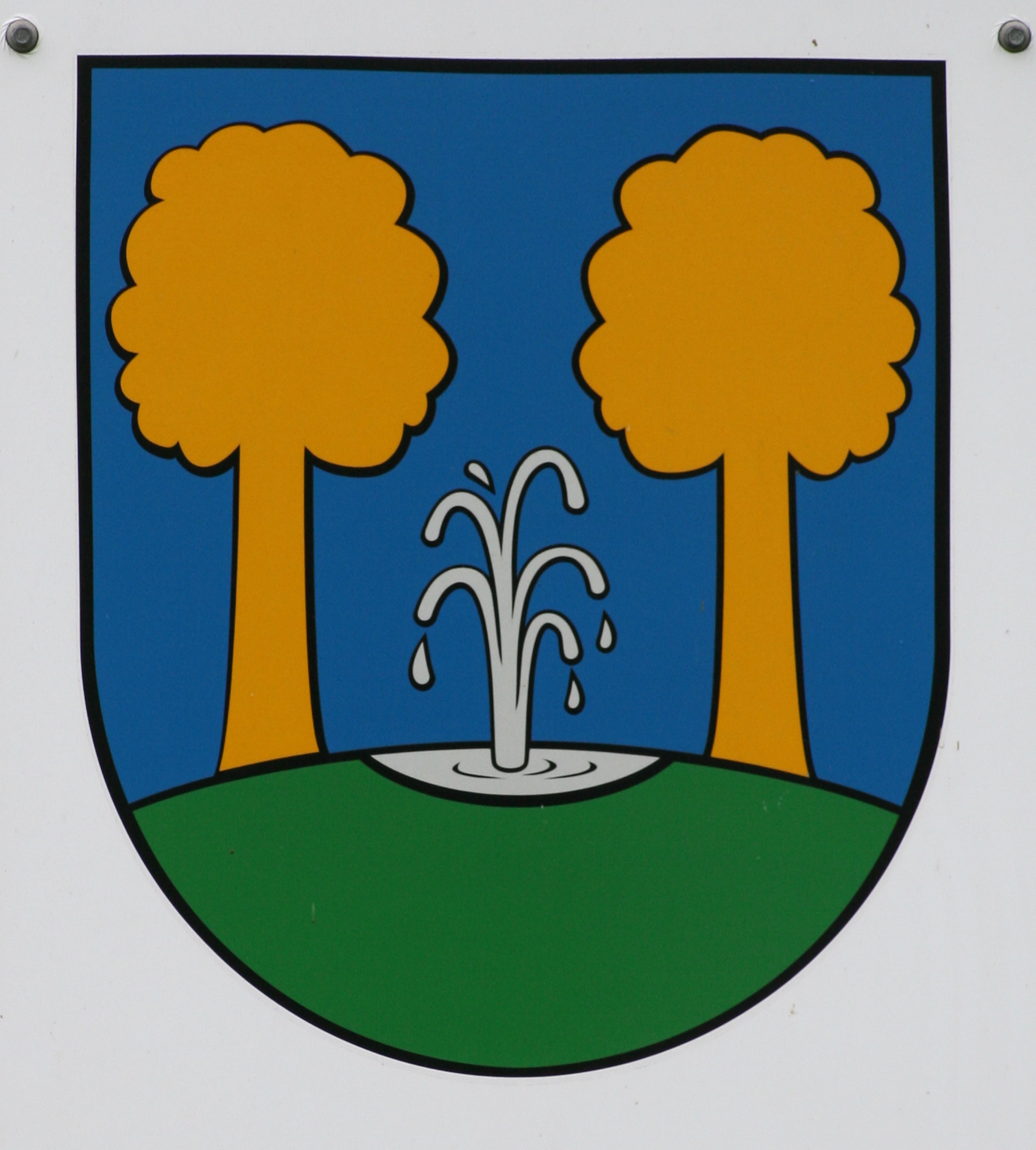 Erb obce Šarišský Štiavnik